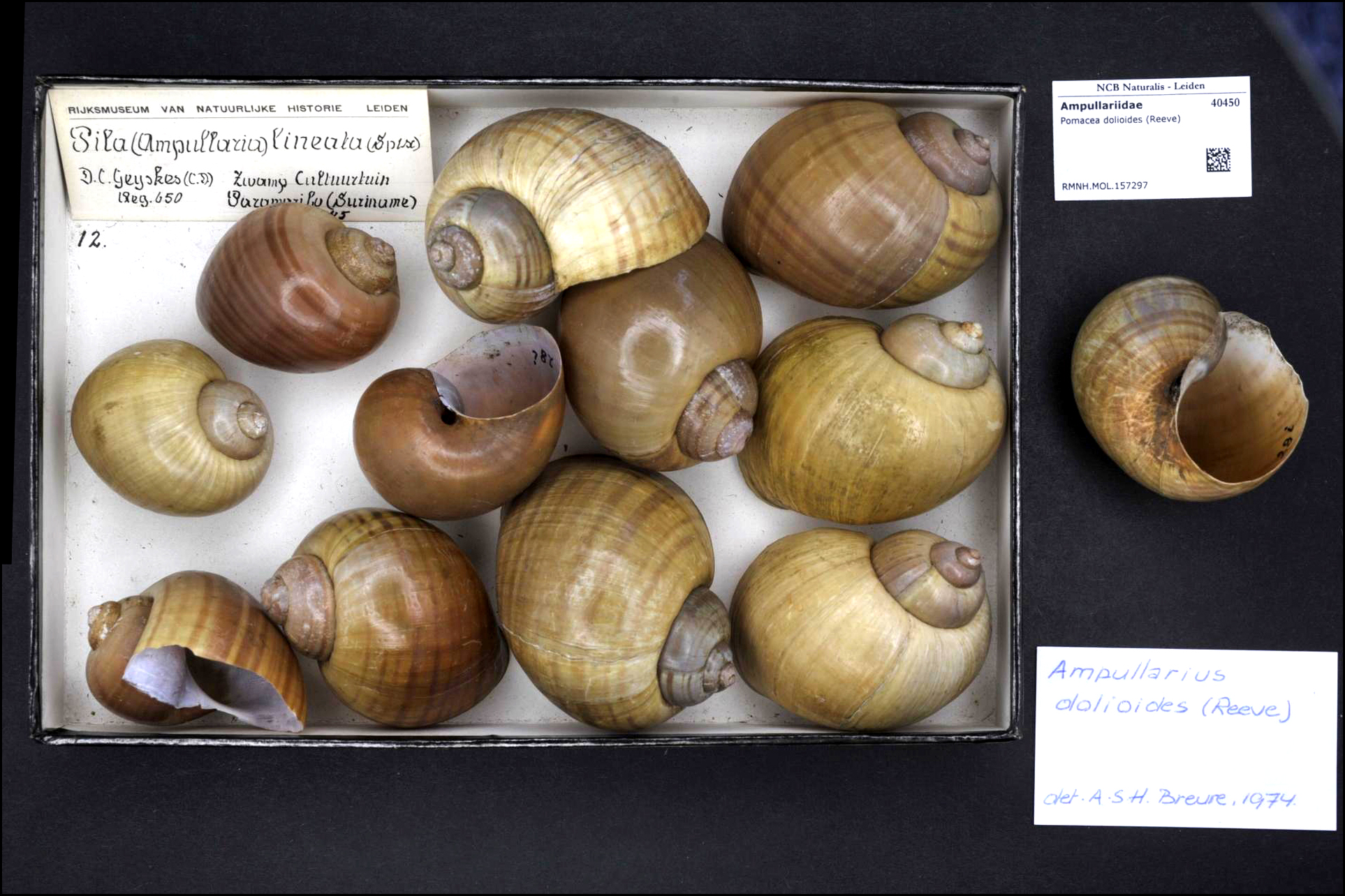 Pomacea dolioides (Reeve, 1856)